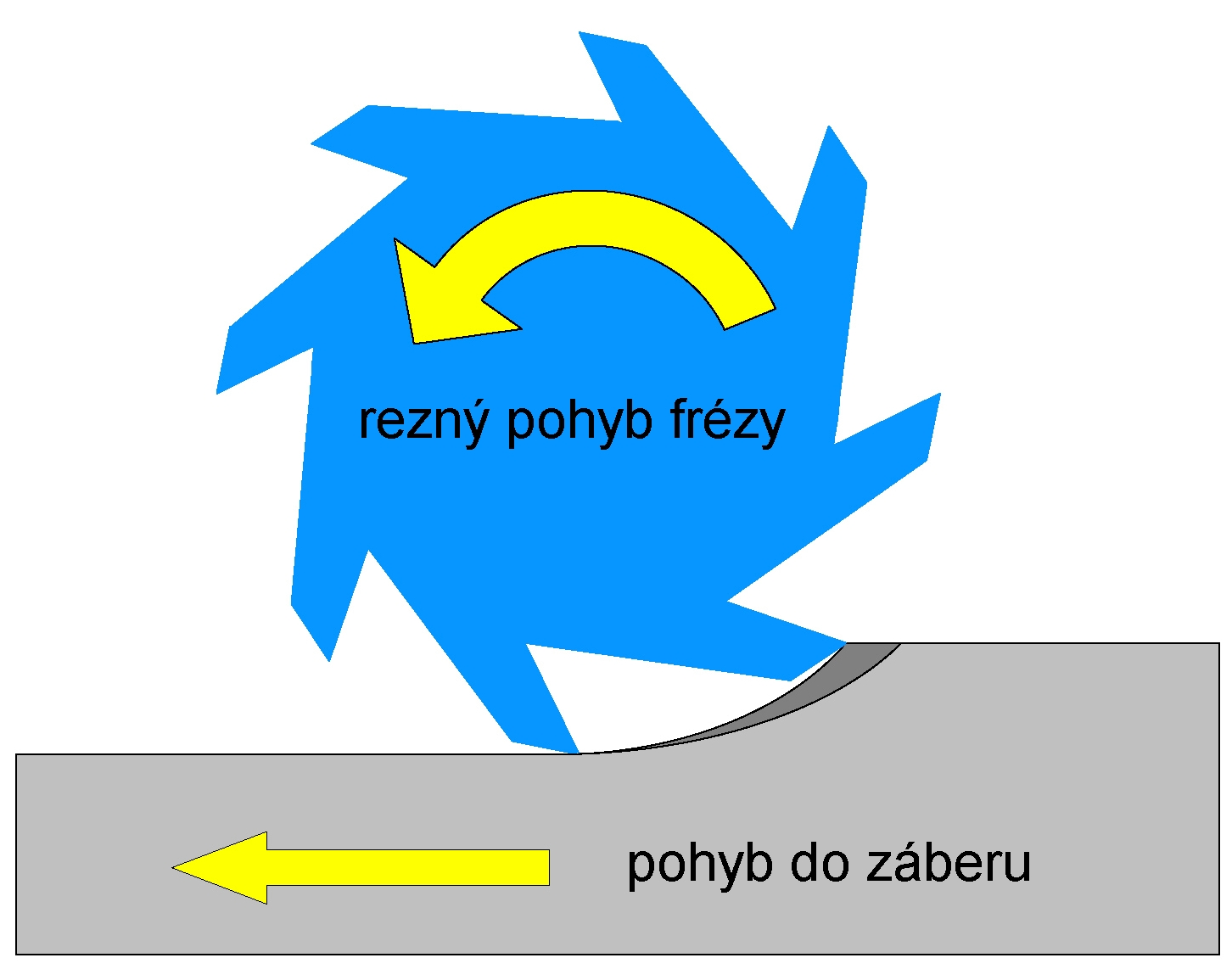 Gegenlauffräsen